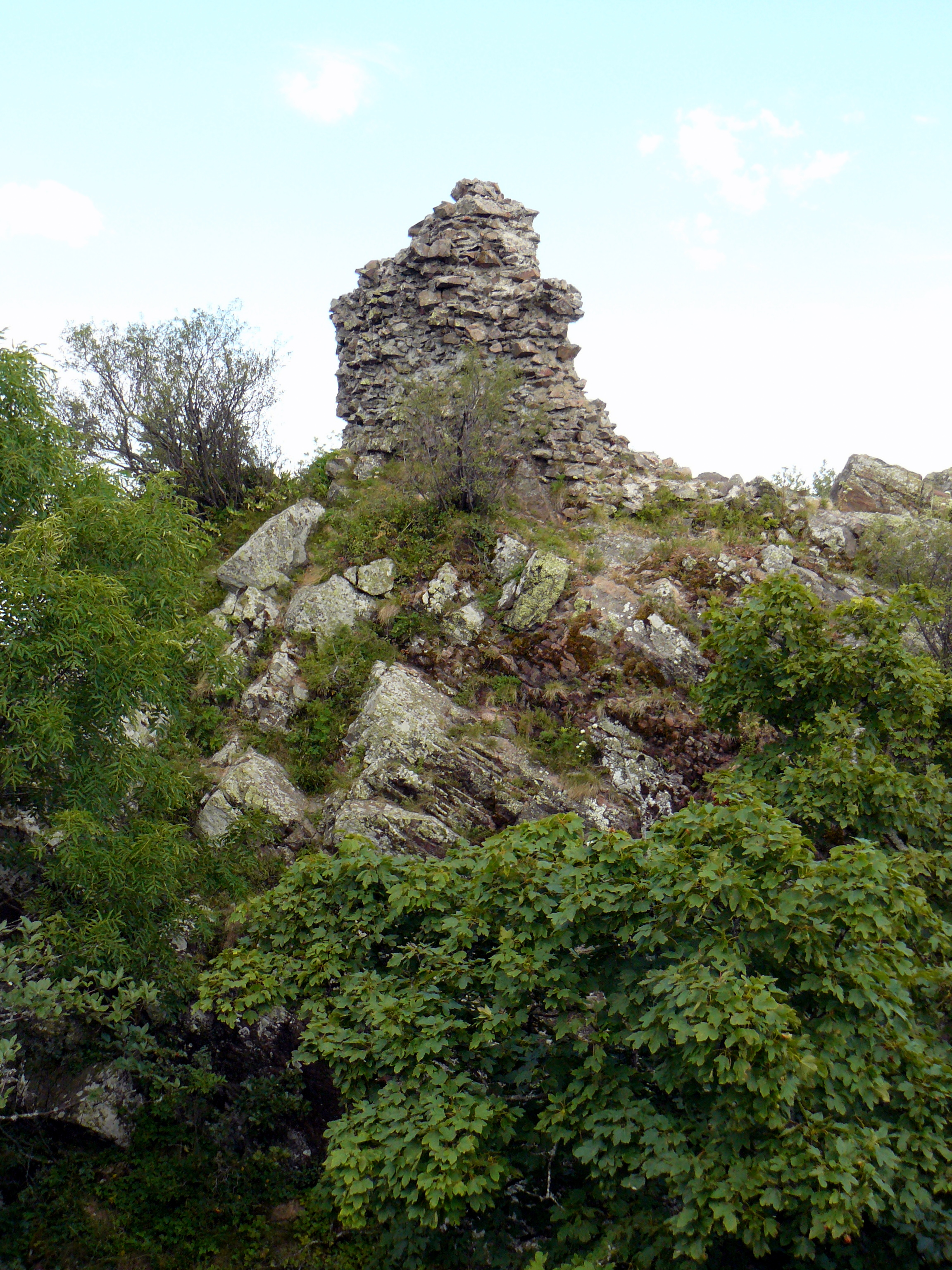 Ruines du château de Herrenfluh, au-dessus de Uffholtz (Haut-Rhin, France)